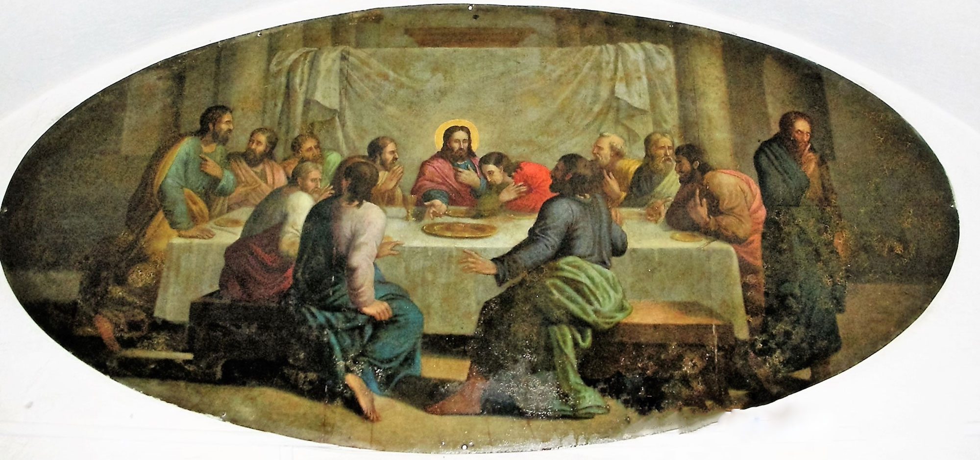 Cina cea de taină - icoană din Biserica Sfântului Nicolae din Șcheii Brașovului